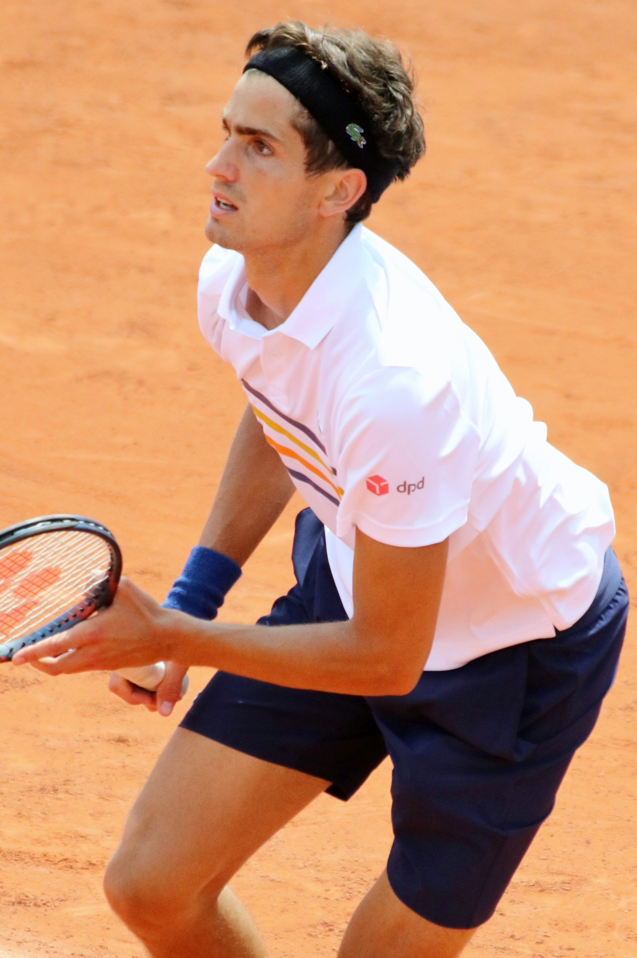 Herbert RG18 (11)